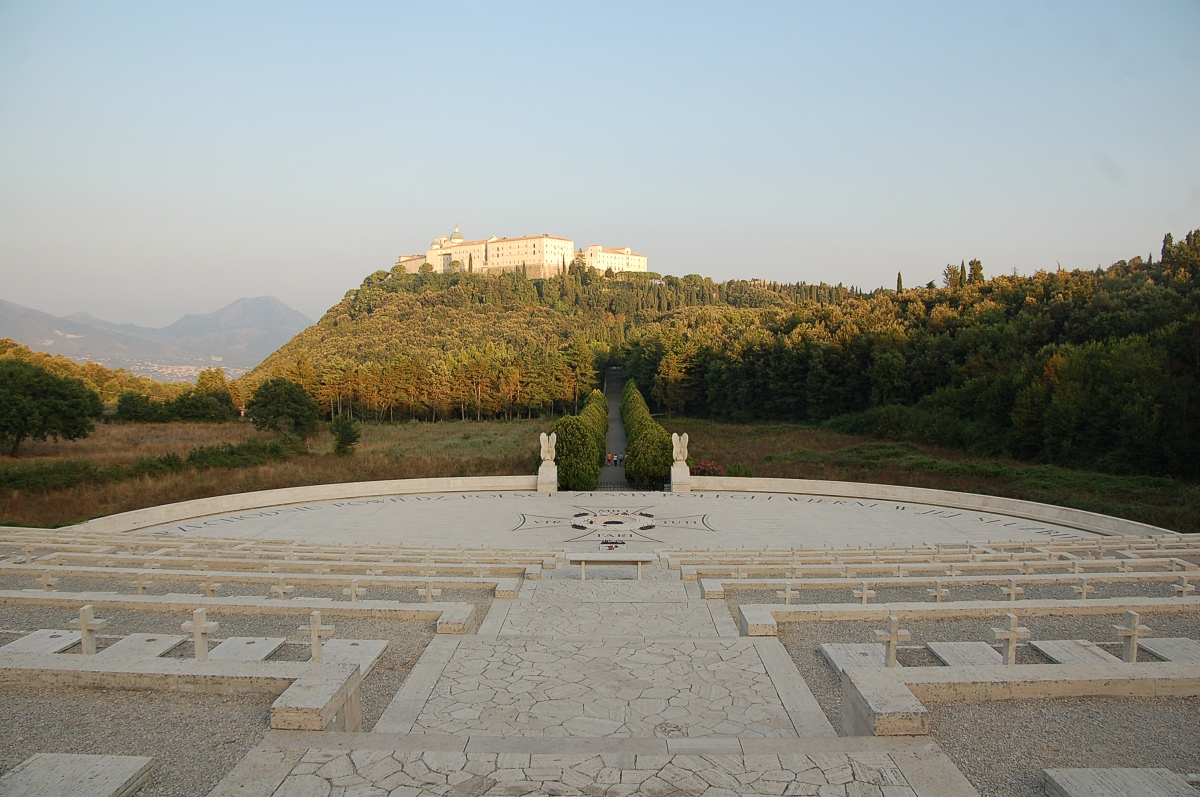 Der poilnische Soldatenfriedhof Monte Cassino